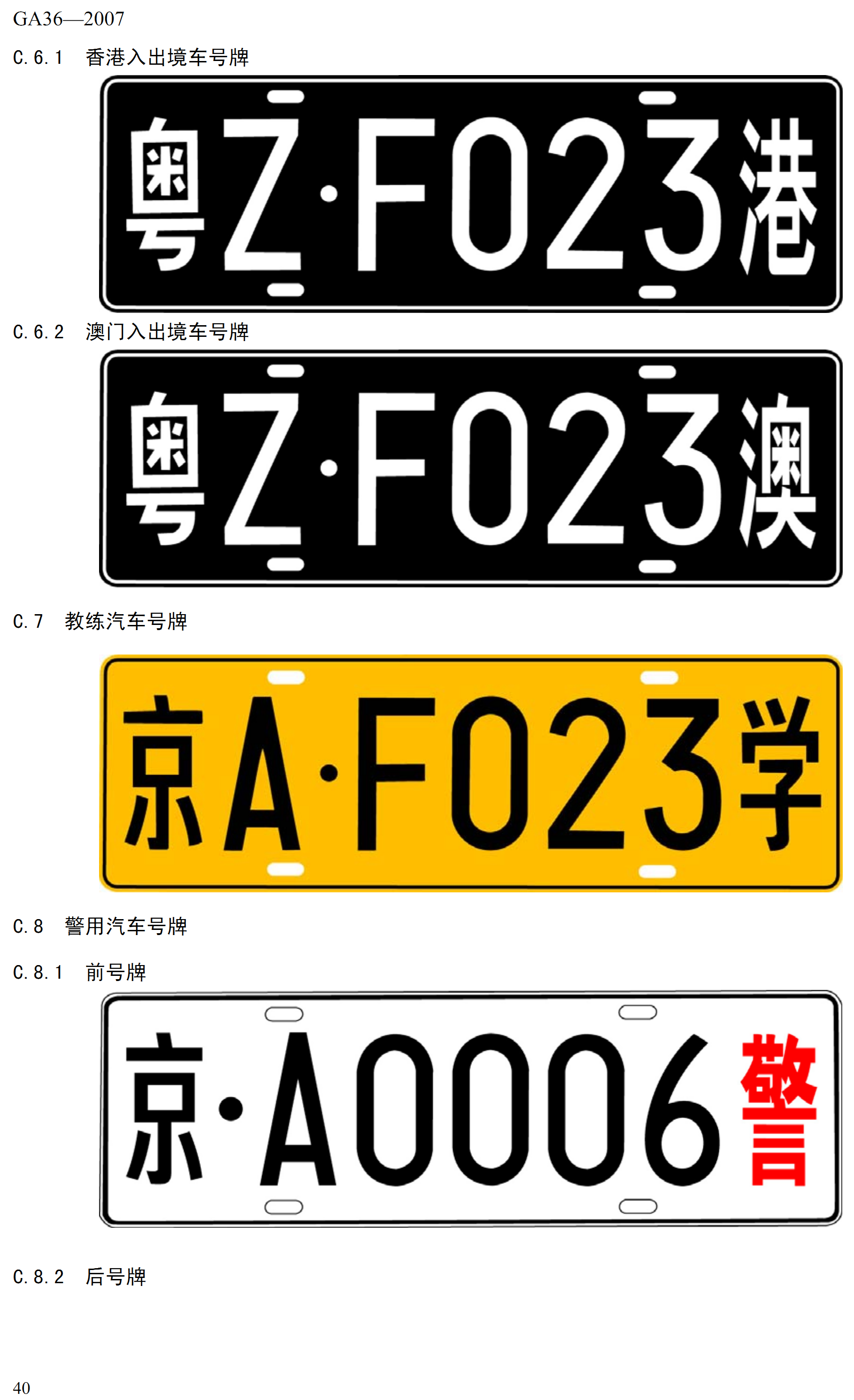 中文（中国大陆）: 中华人民共和国机动车号牌示意图(3)